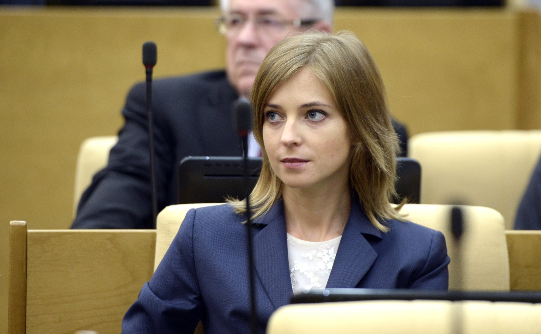 Наталья Поклонская на первом заседании Государственной Думы Федерального Собрания Российской Федерации седьмого созыва